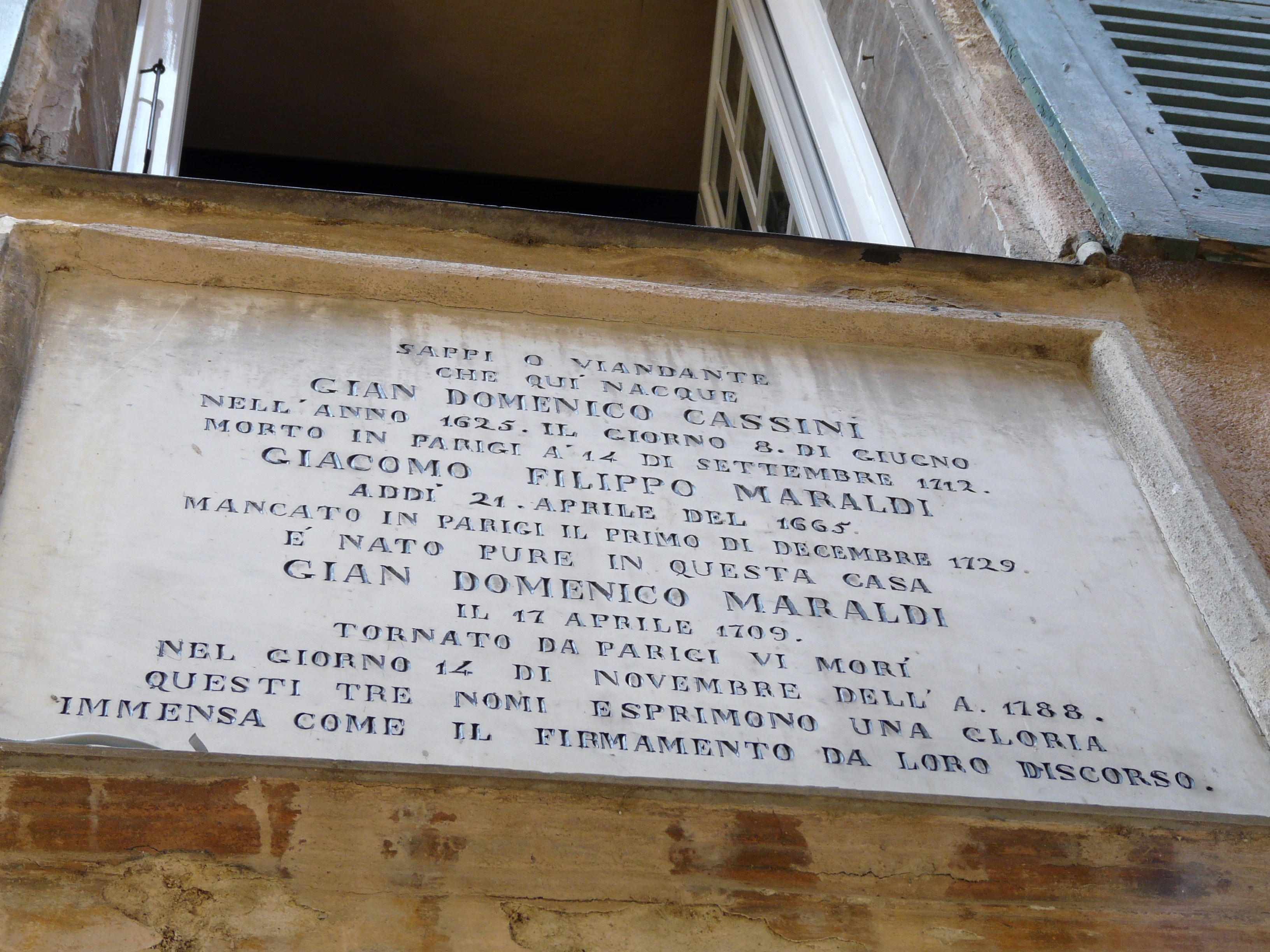 Targa commemorativa di Perinaldo, Liguria, Italia